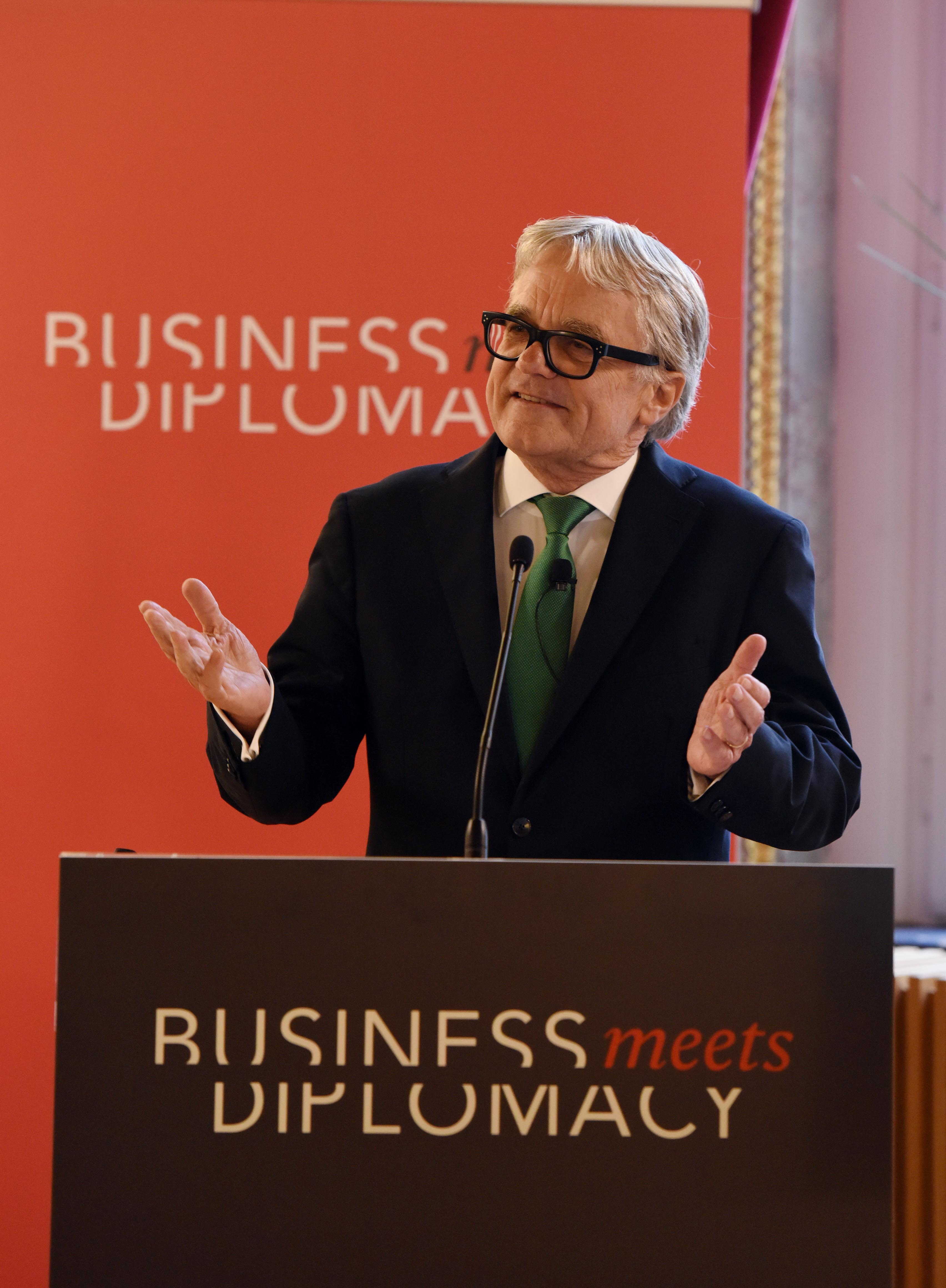 Wien am 29 September 2016 Im Rahmen von Business meets Diplomacy treffen prominente VertreterInnen der österreichischen Wirtschaft mit dem ausländischen Diplomatischen Corps zusammen um Einblicke in das heimische Wirtschaftsleben zu erhalten. Generalsekretär Michael Linhart diskutierte heute zusammen mit Wolfgang Eder Chef des Weltstahlverbands, über wirtschaftspolitischen Themen und internationale Perspektiven. Foto: Mahmoud